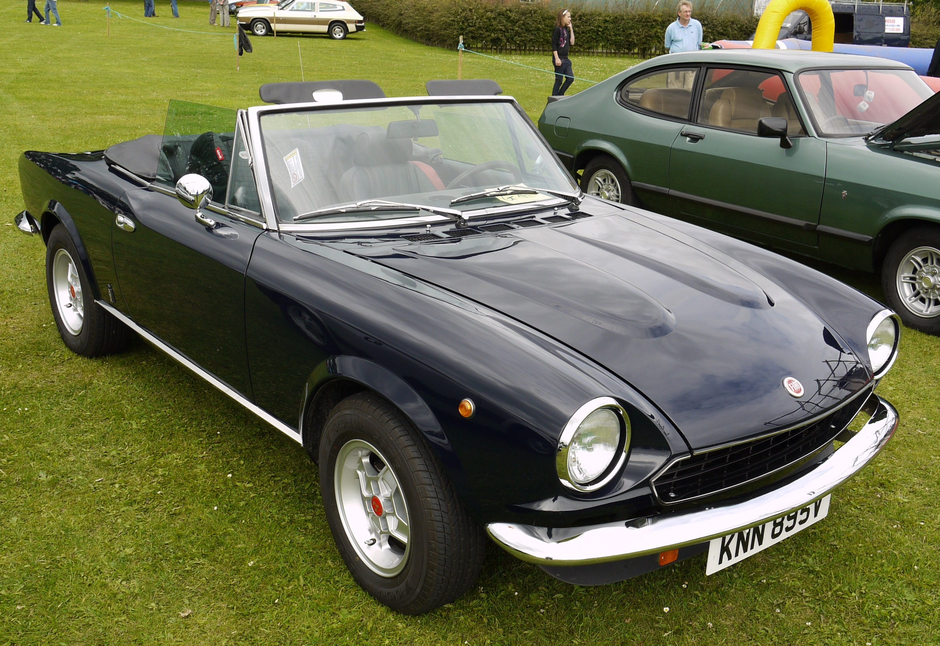 Panasonic G1